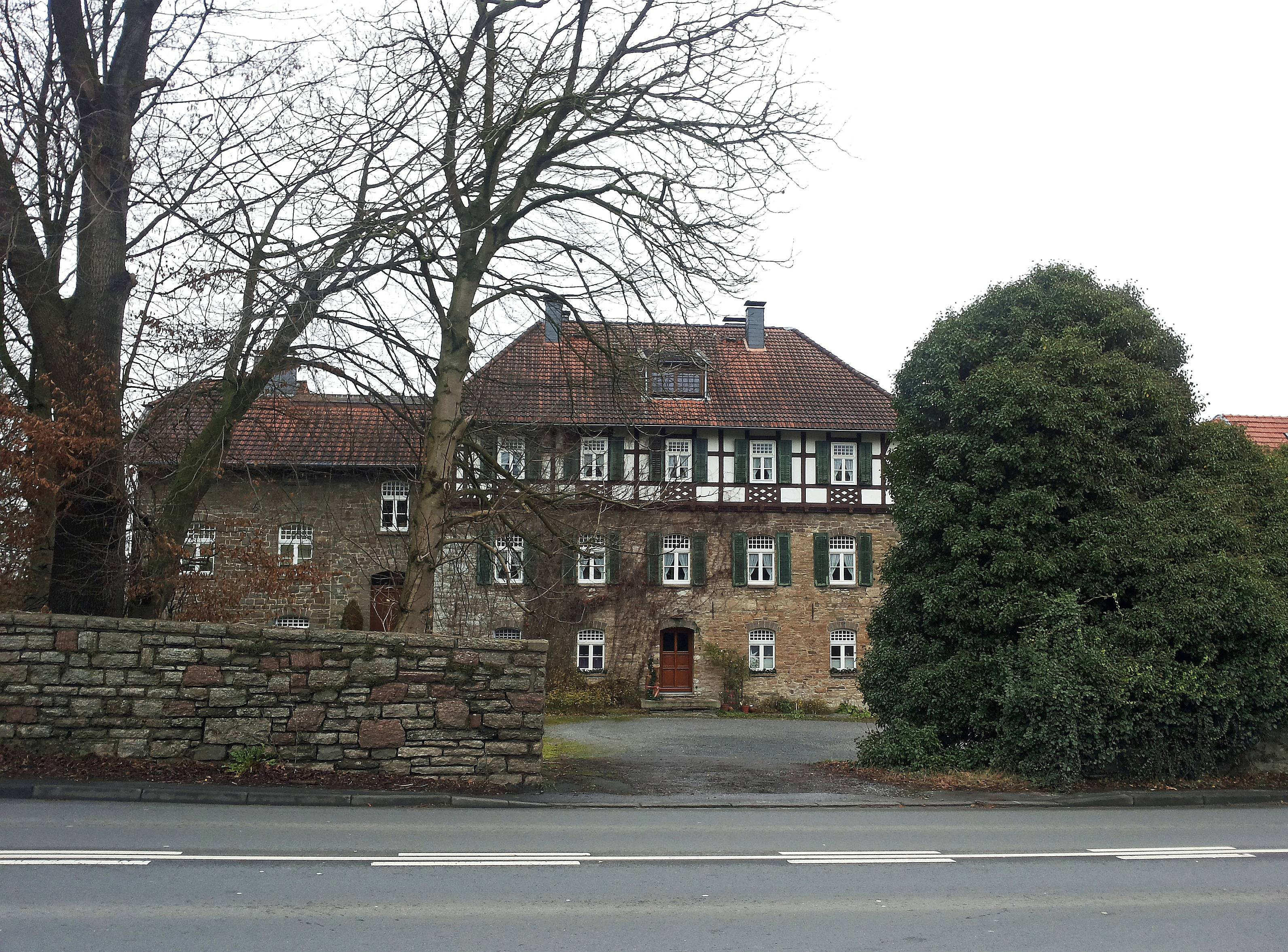 denkmalgeschützter Allehof in Küntrop (Neuenrade), Germany